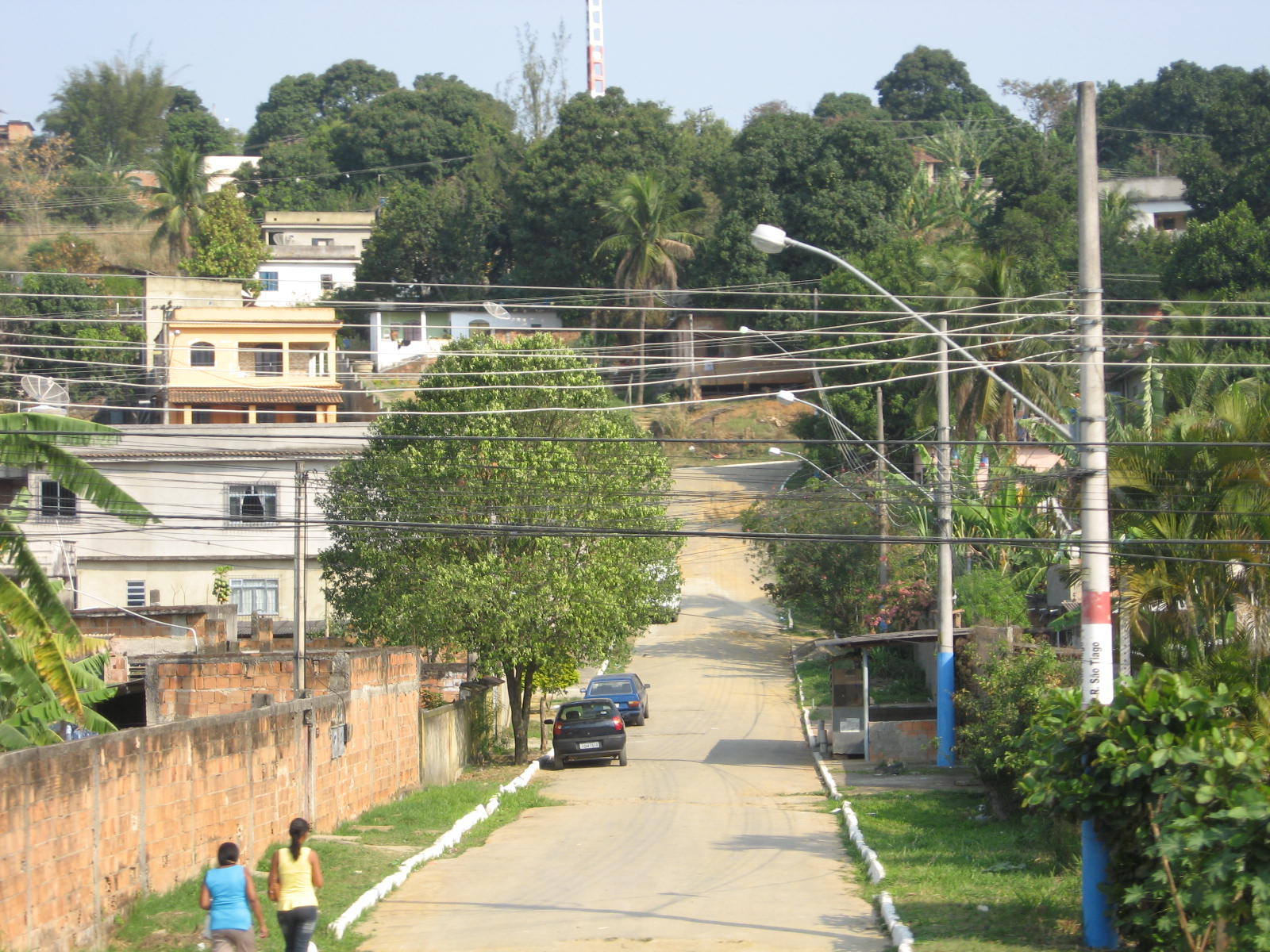 Vista de Japeri.